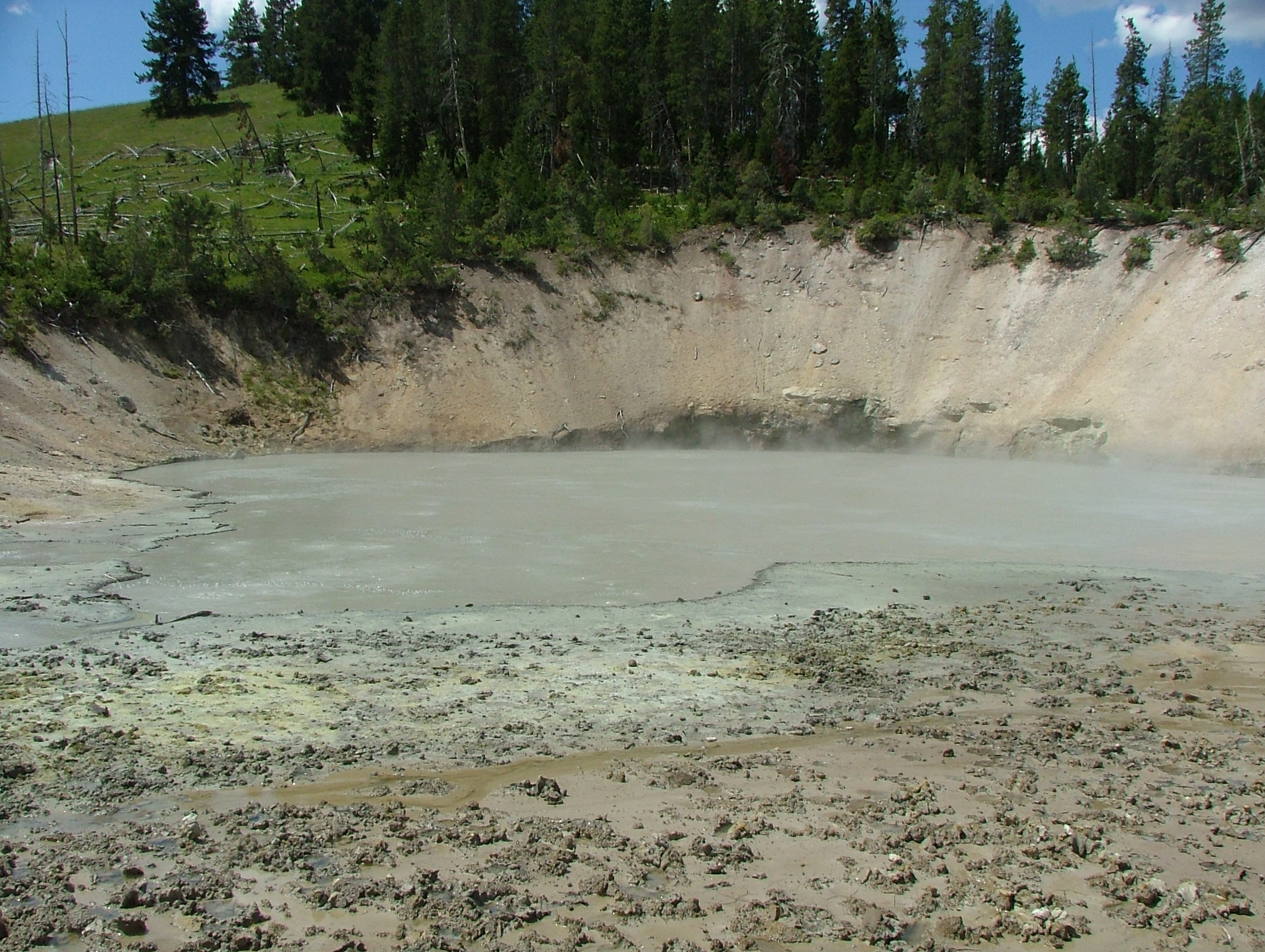 Mod Volcano, Yellostone National Park